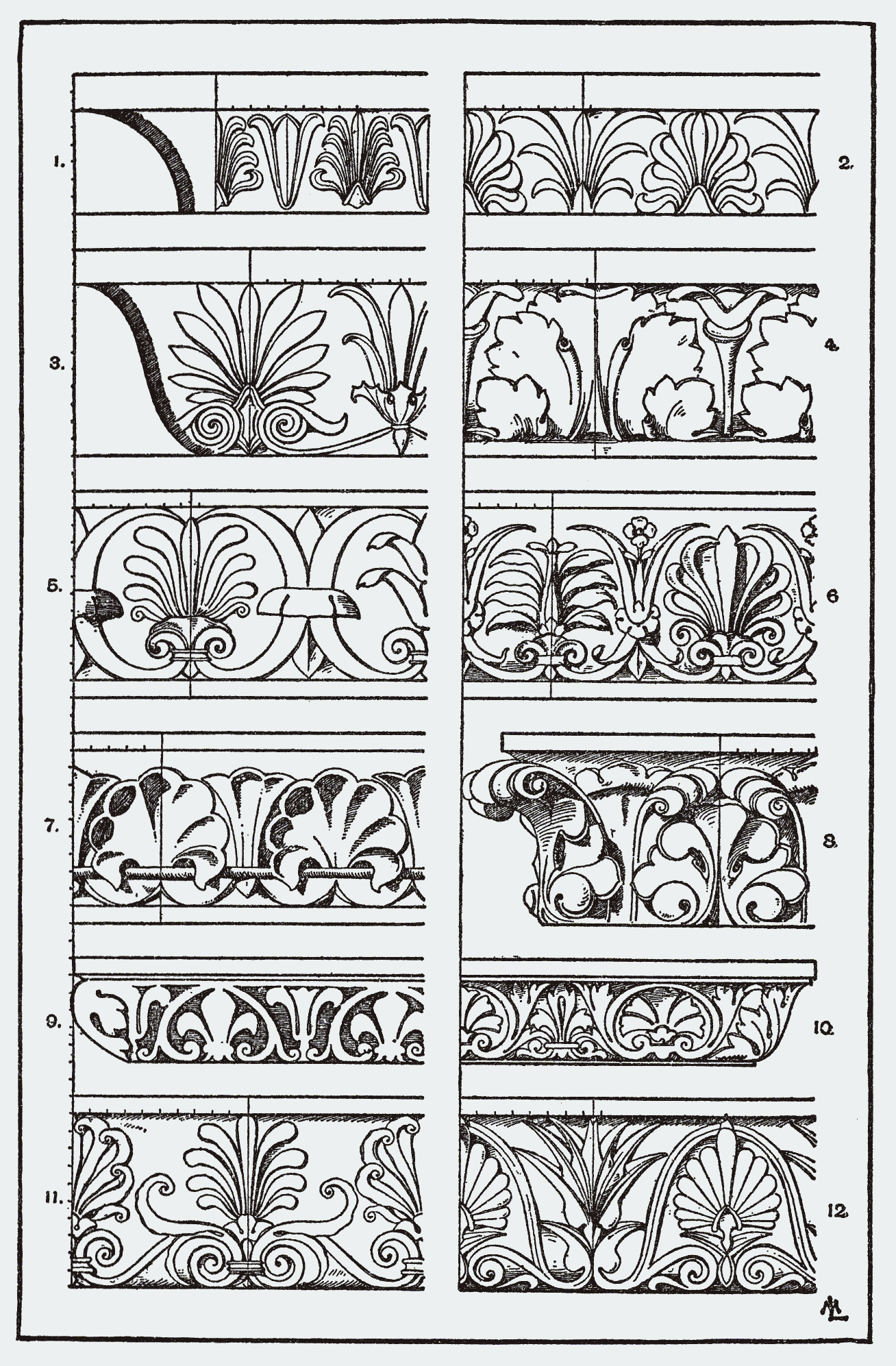 Ornamentación de cimacios